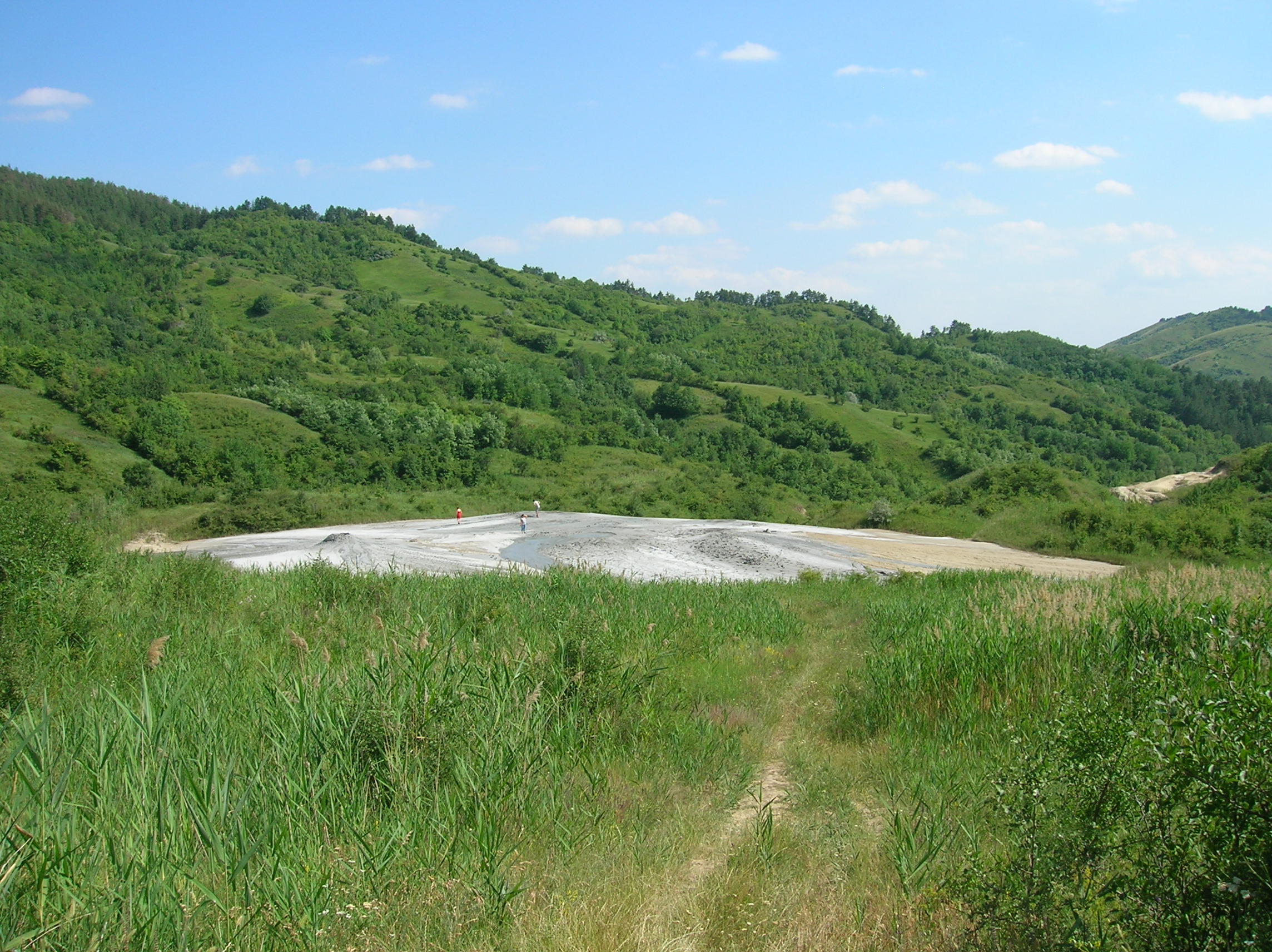 Near village Beciu (Scorţoasa commune)